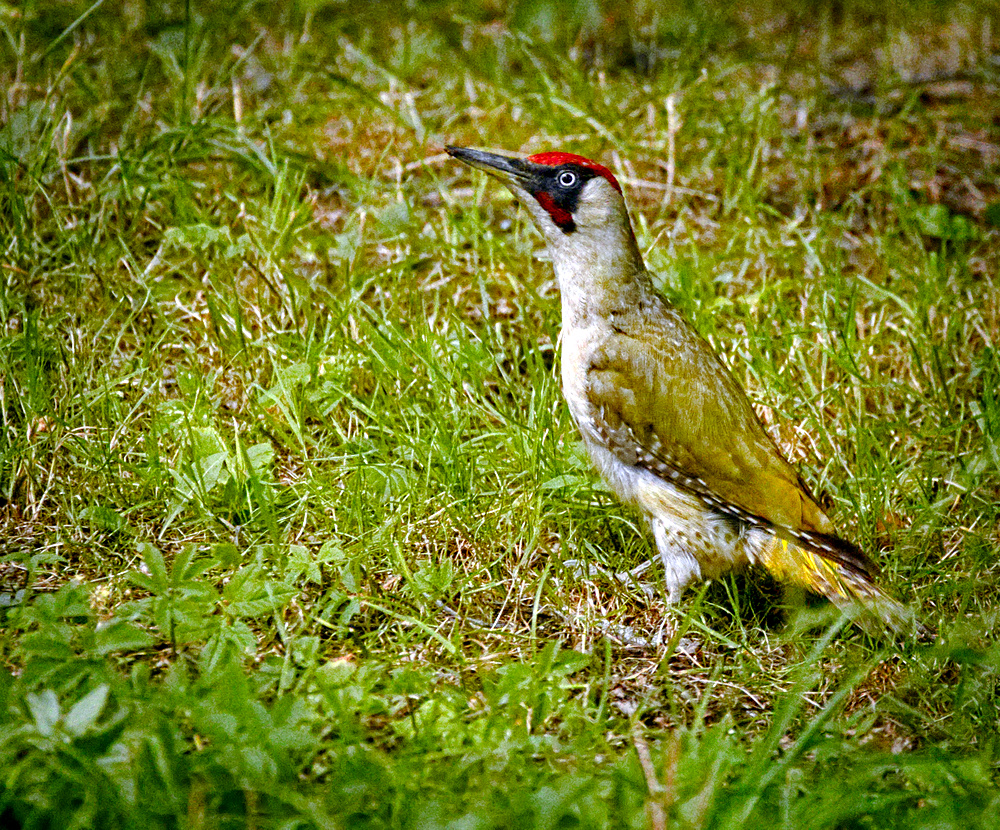 Male green woodpecker (Picus viridis) on the grass. Samiec dzięcioła zielonego (Picus viridis) na trawie.